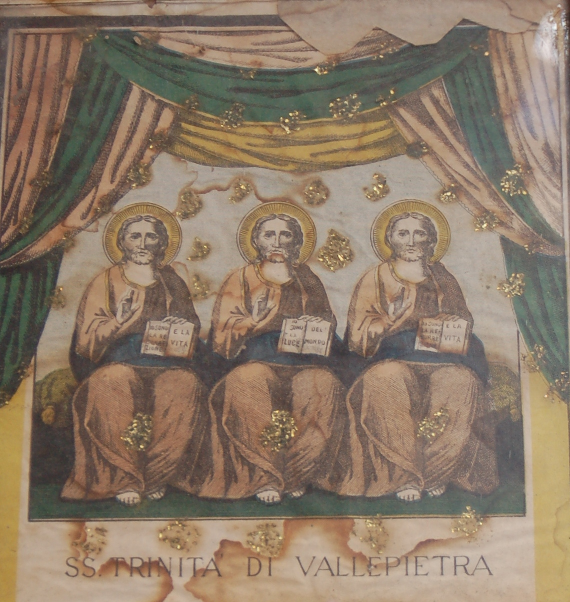 cuadro que representa a la Trinidad (santuario della Santissima Trinità - Vallepietra RM)